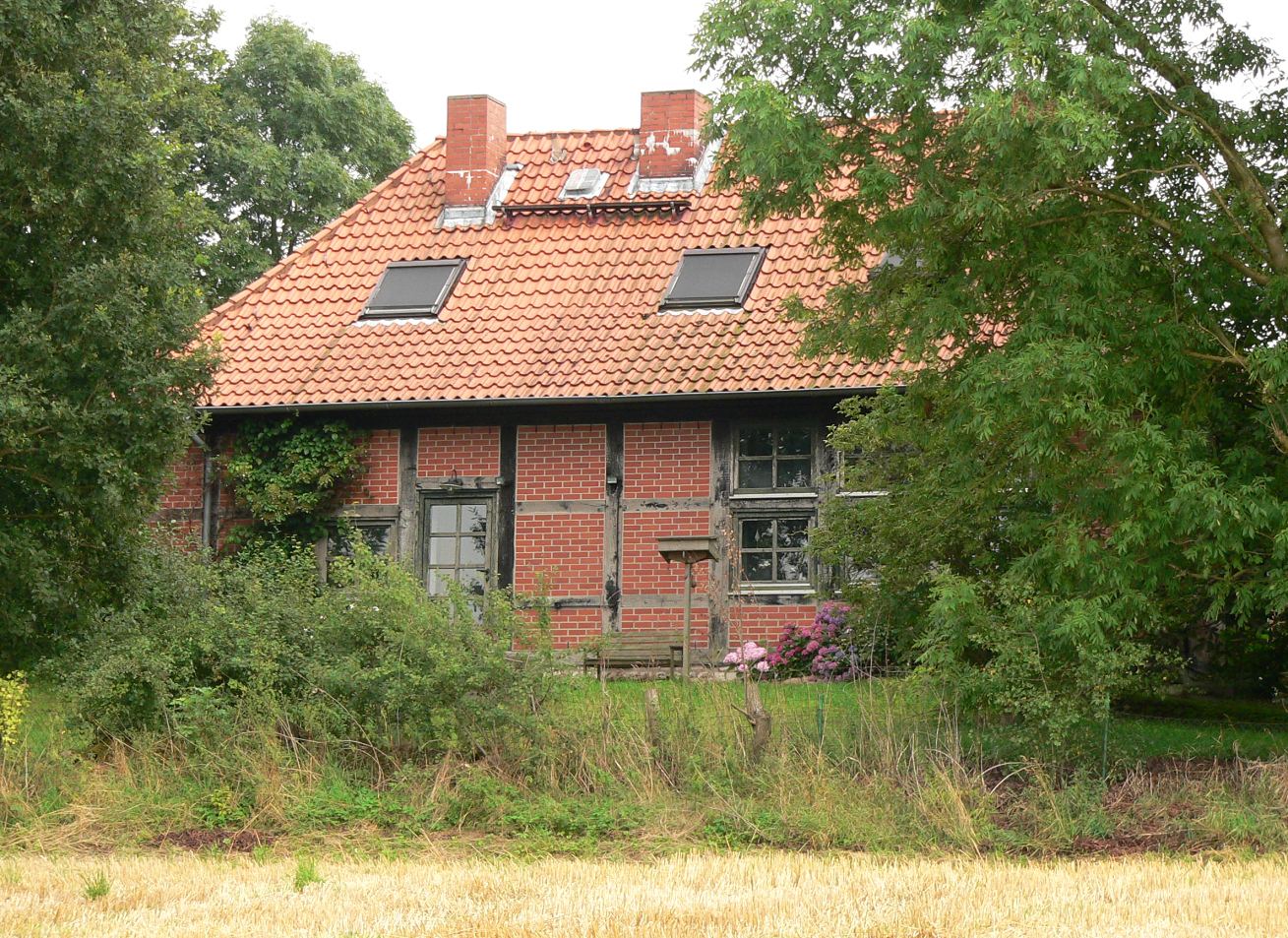 Frühere Konditorei als letztes erhaltenes Gebäude des Jagdschlosses Linsburg, um 1980 renoviert.